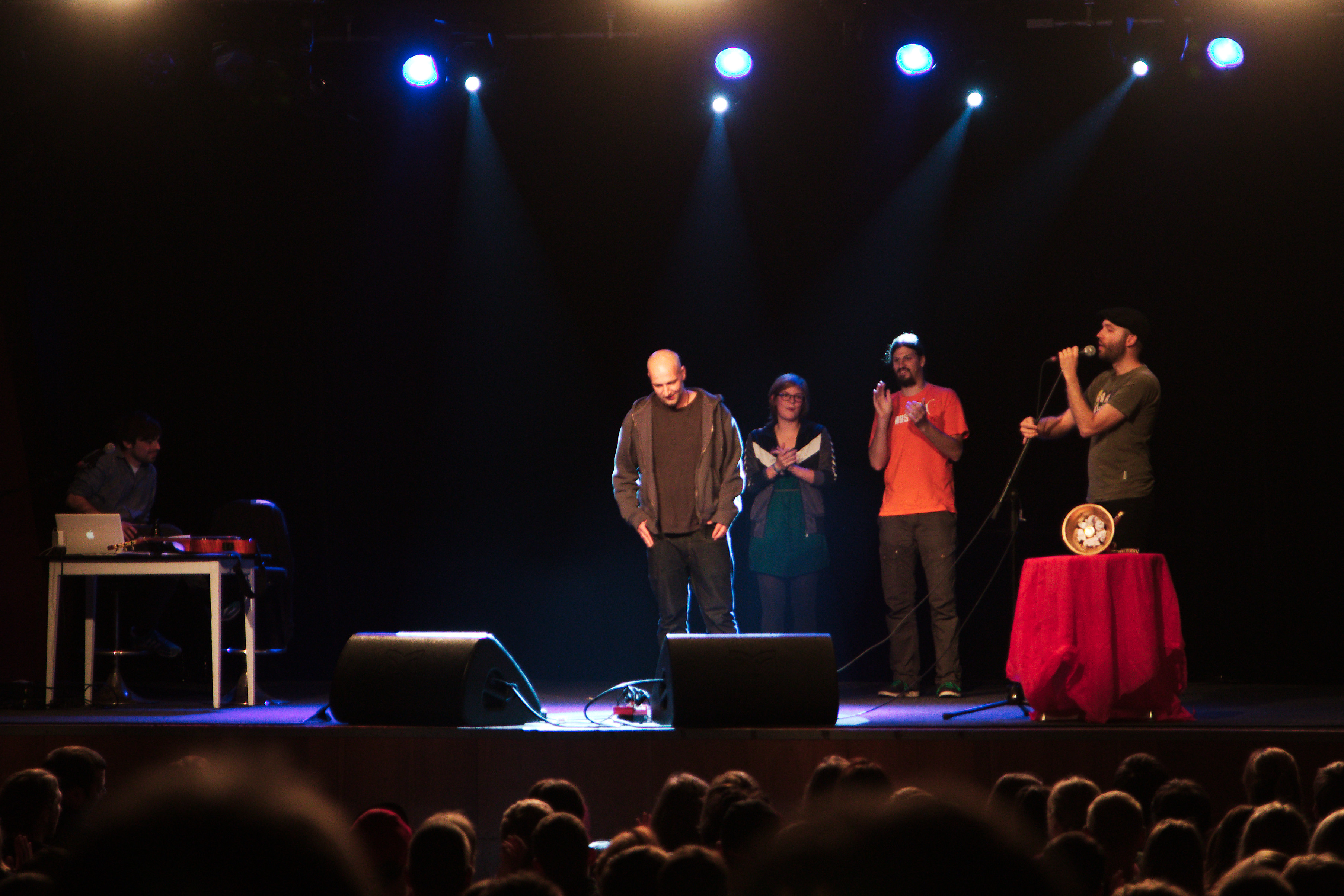 am Rechner: Sebastian Lehmann Glatze: Florian Cieslik Svenja Gräfen Orange: Michael Goehre Moderation: Marc-Uwe Kling